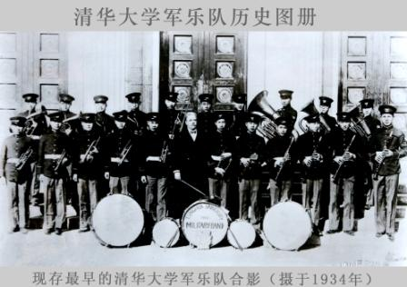 清华大学军乐队现存最早的合影，1934年摄于清华大学大礼堂前。图片来源：清华大学学生艺术团军乐队。